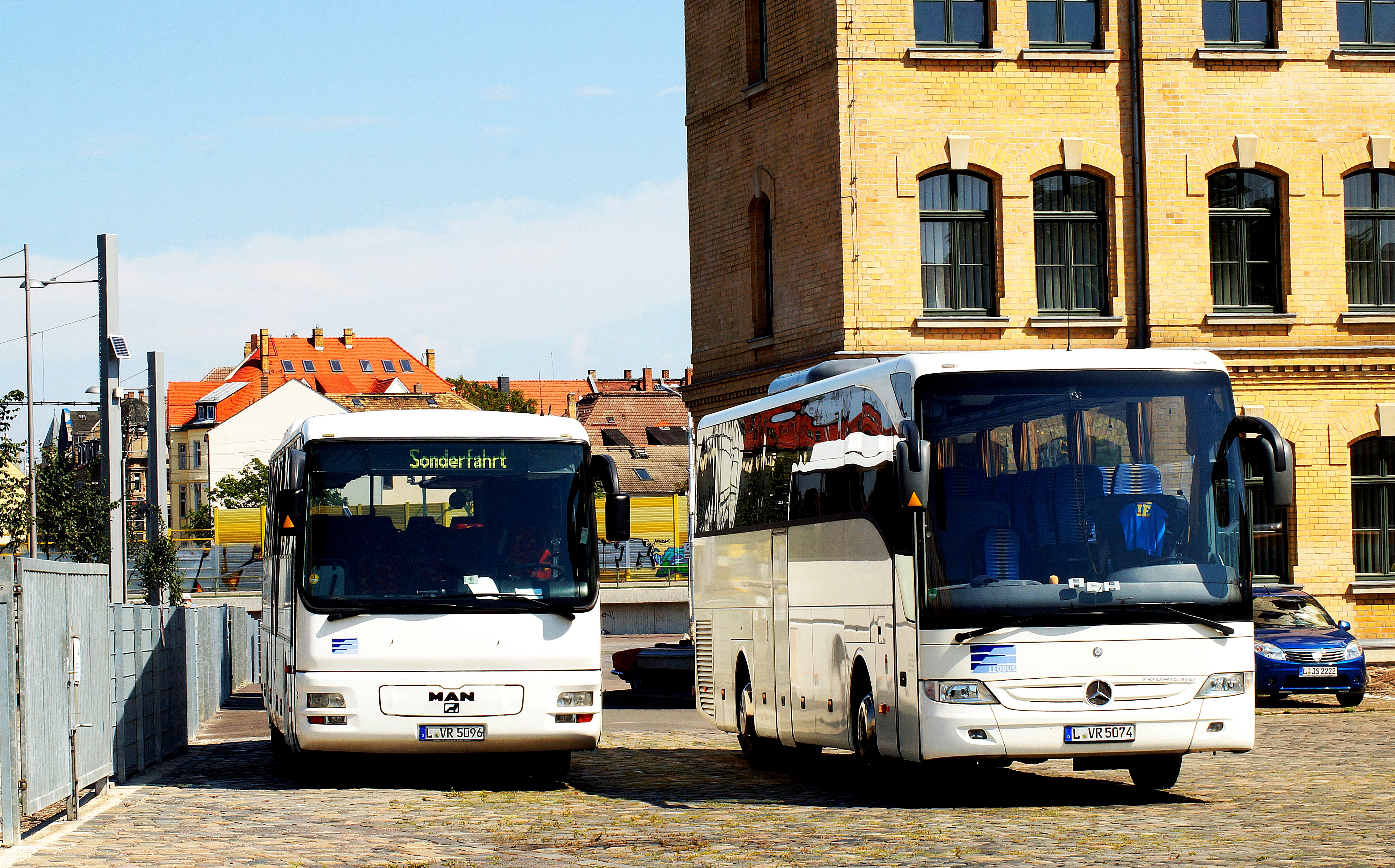 Reisebusse im Bushof Lindenau